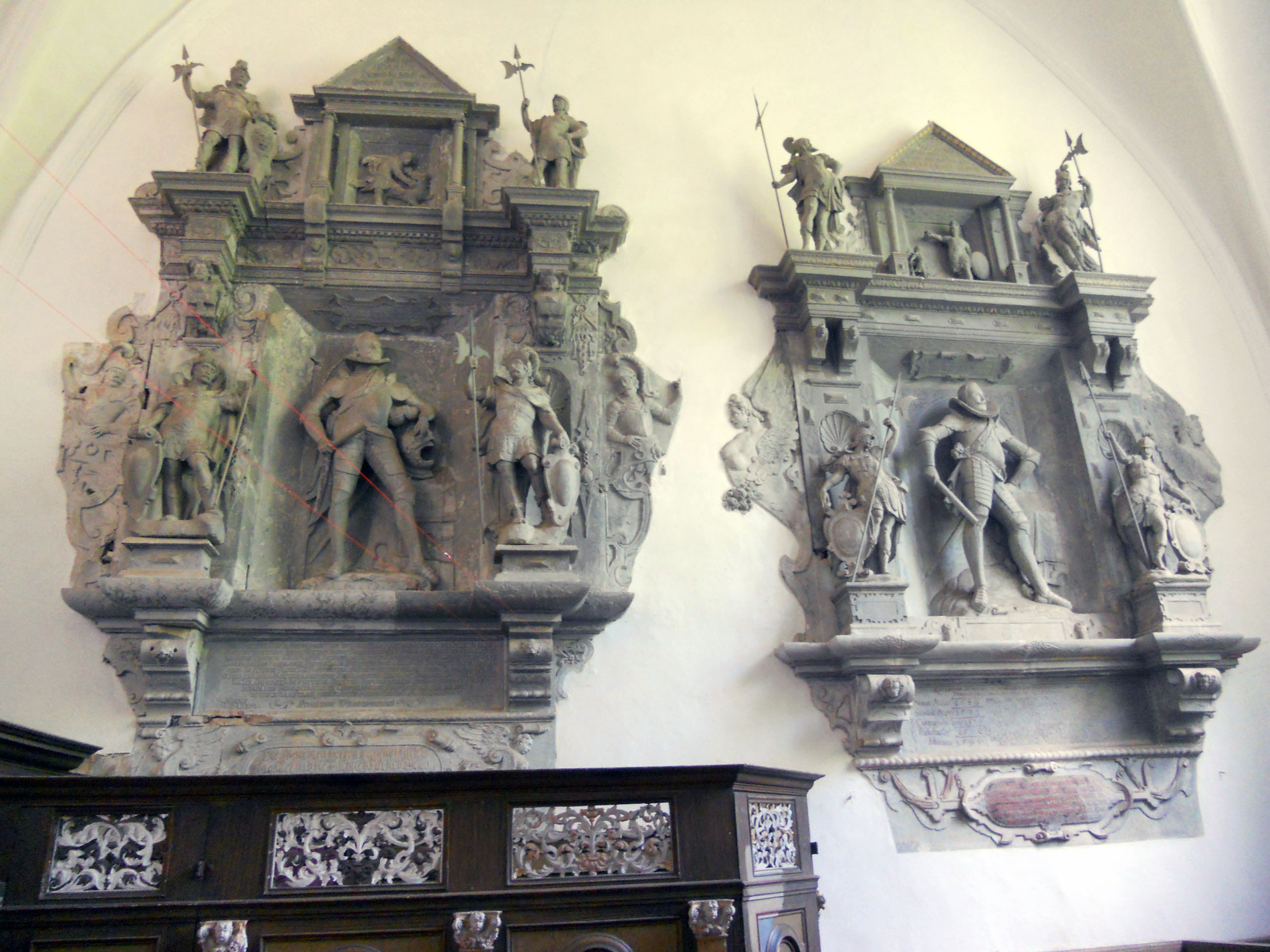 Vilmnitz Wandrelief